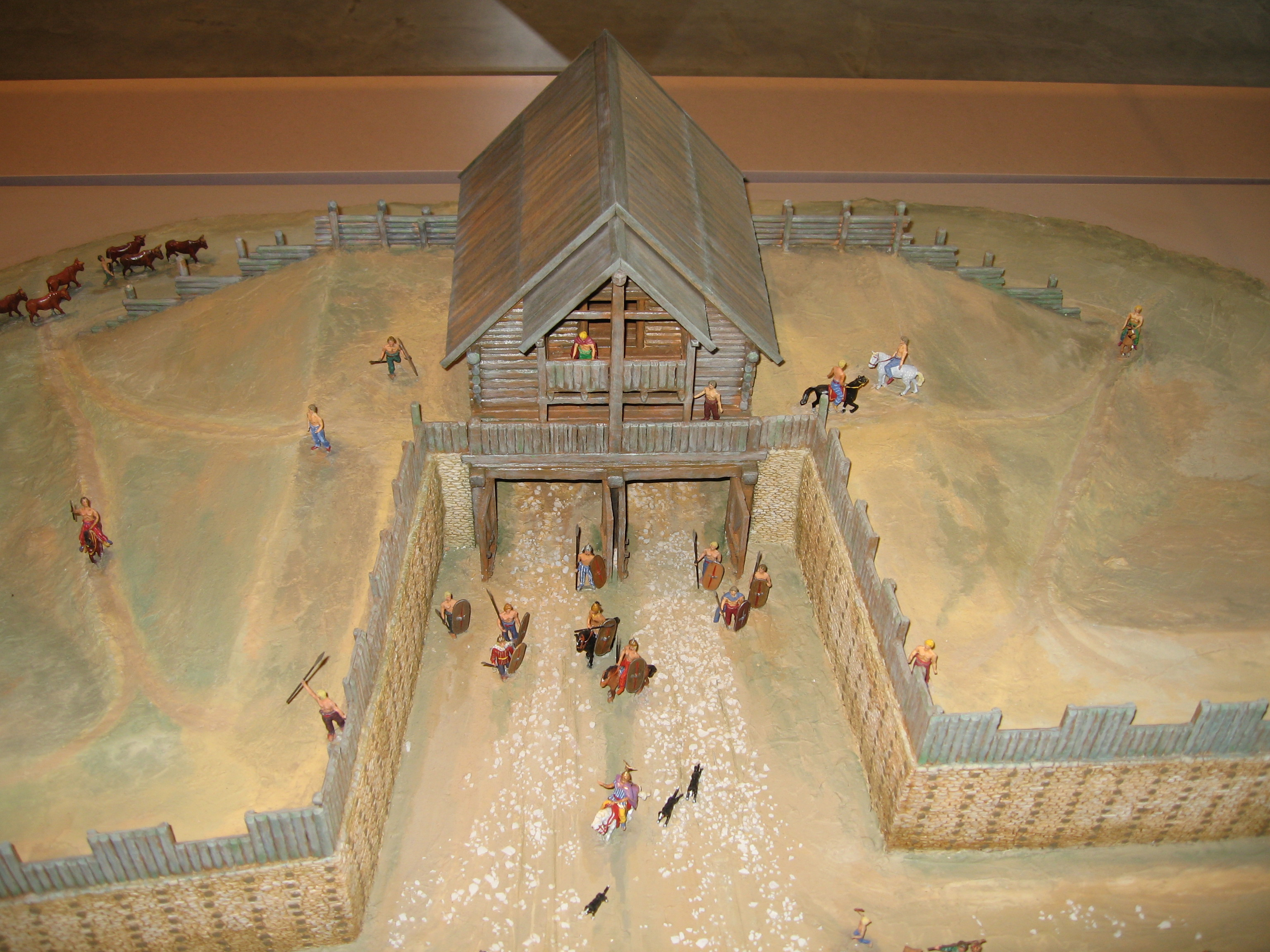 Rekonstruktion des Osttores des Oppidum Manching (Keltenmuseum Manching)